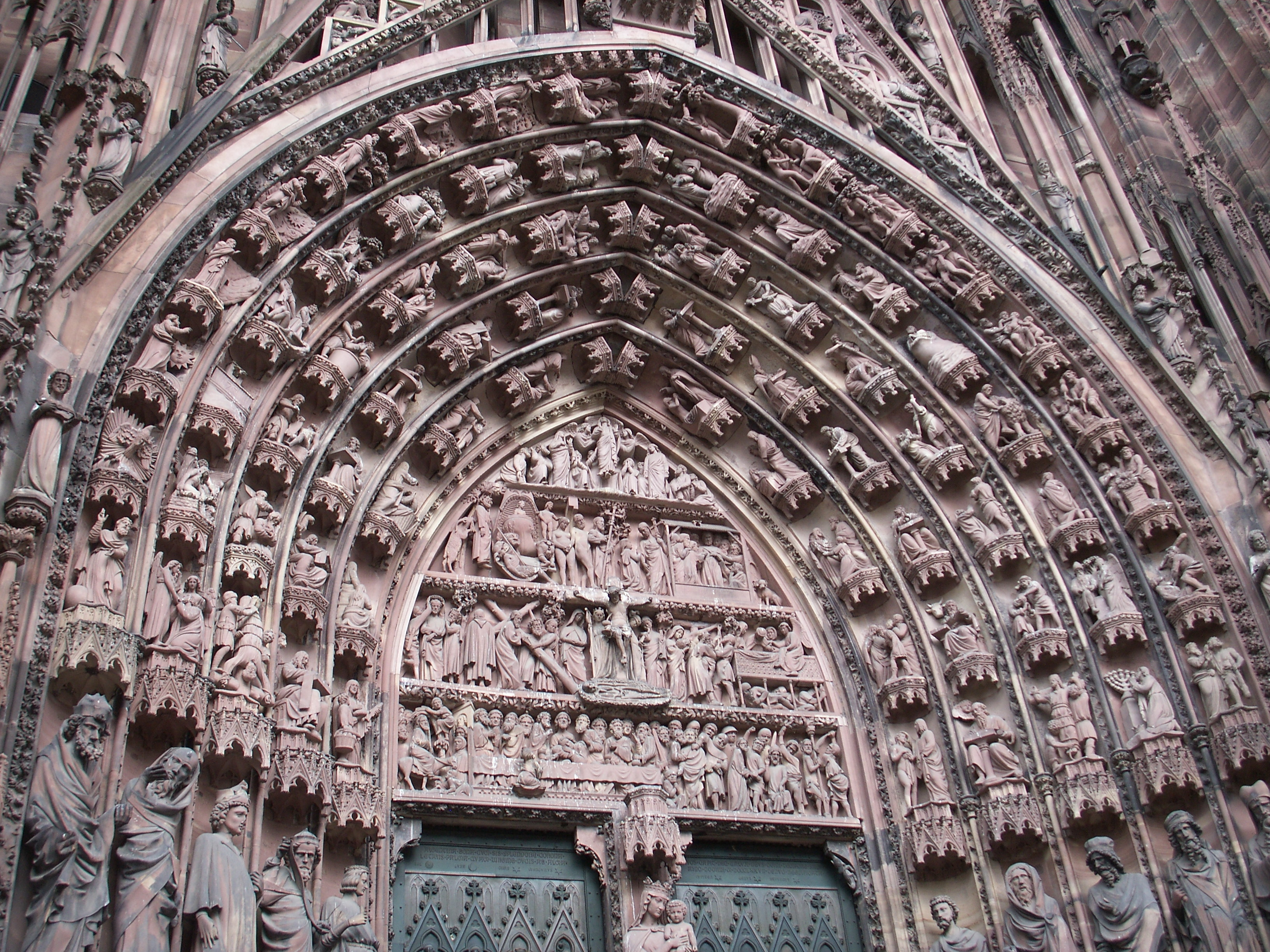 Cathédrale Notre-Dame de Strasbourg, mittleres Portal